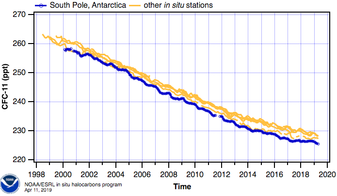 Concentration atmosphérique mesurée au Pôle Sud (Antarctique), du gaz CFC-11 (ou trichlorofluorométhane) à date du 11 avril 2019. Graphe réalisé par le laboratoire Earth System Research Laboratory de l'agence américaine National Oceanic and Atmospheric Administration.